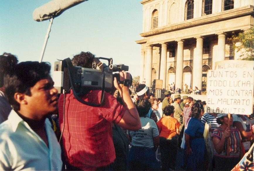 Celebración del Día Internacional de la Mujer Trabajadora en Managua, Nicaragua, America Central en 1988.